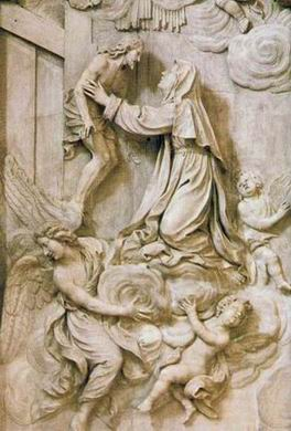 Ticciati, S. Caterina abbracciata dal Crocifisso, basilica di s. caterina prato